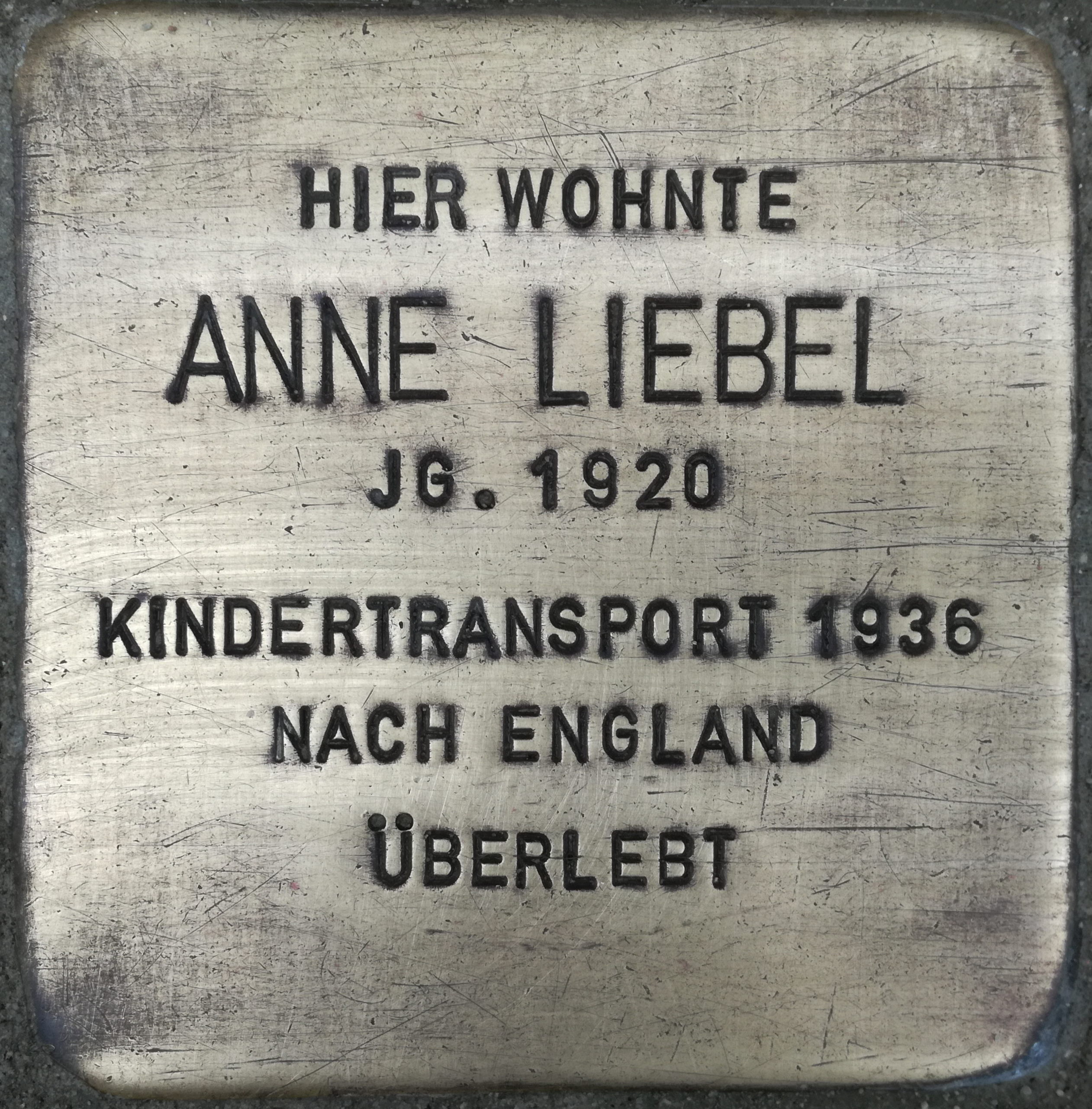 Hier wohnte Anne Liebel Jahrgang 1920 Kindertransport 1936 nach England überlebt